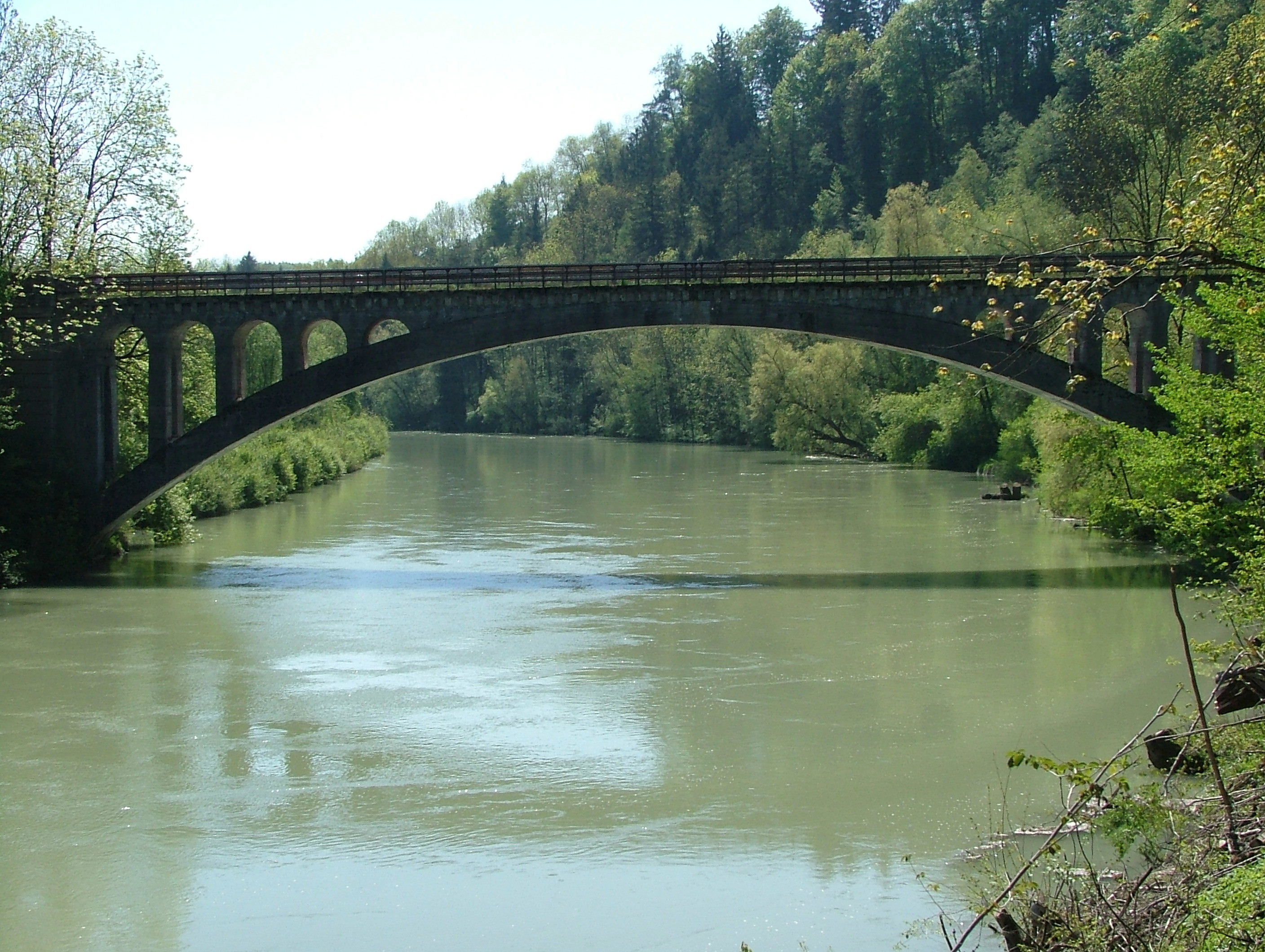 Eisenbahnbrücke zwischen Illerbeuren und Lautrach